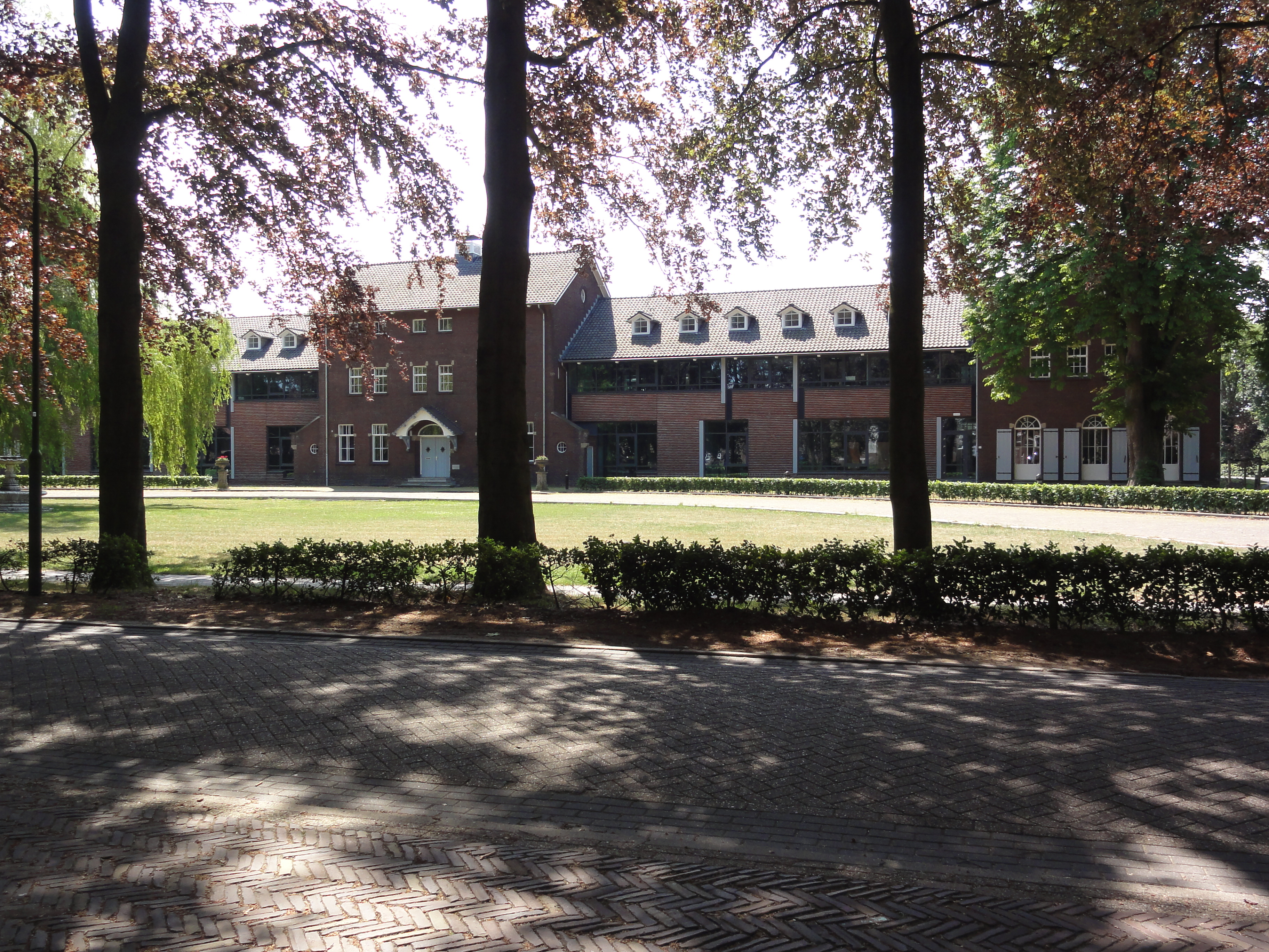 Heeswijk abdij Berne, nieuw voormalig gymnasium